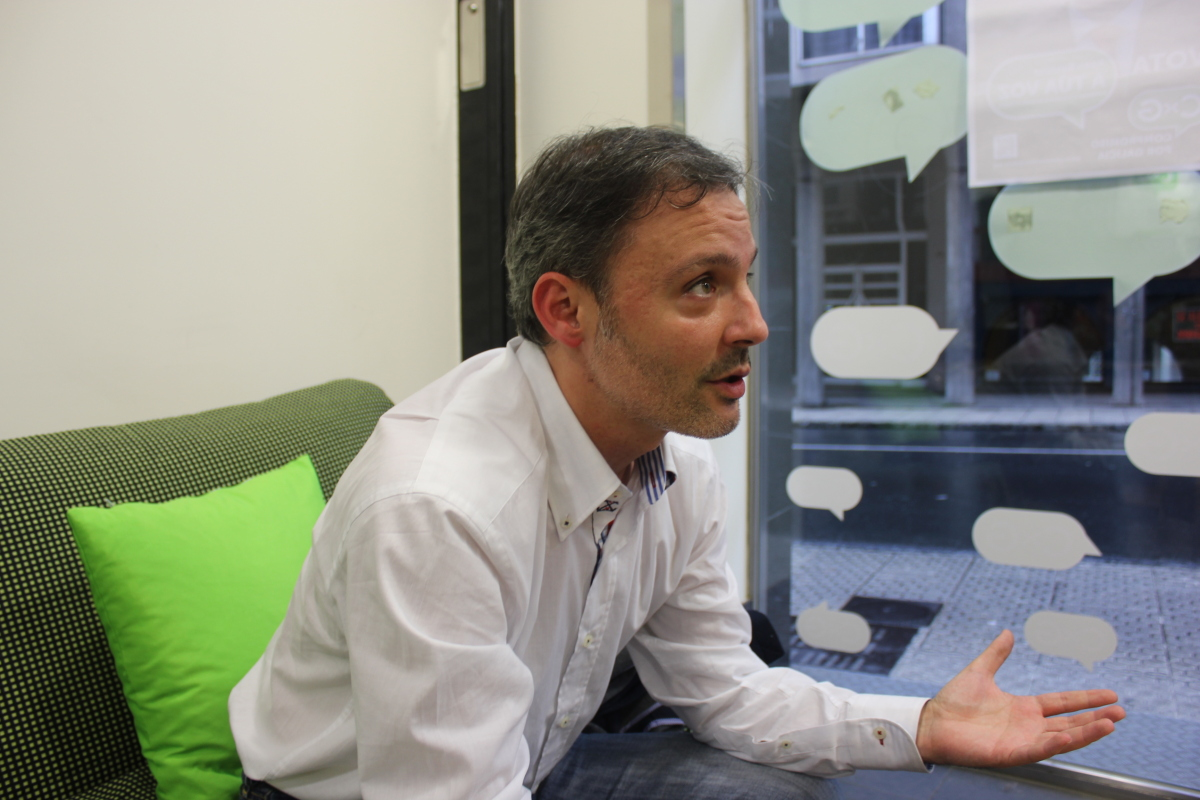 Xoán Bascuas político galego do partido Compromiso por Galicia.